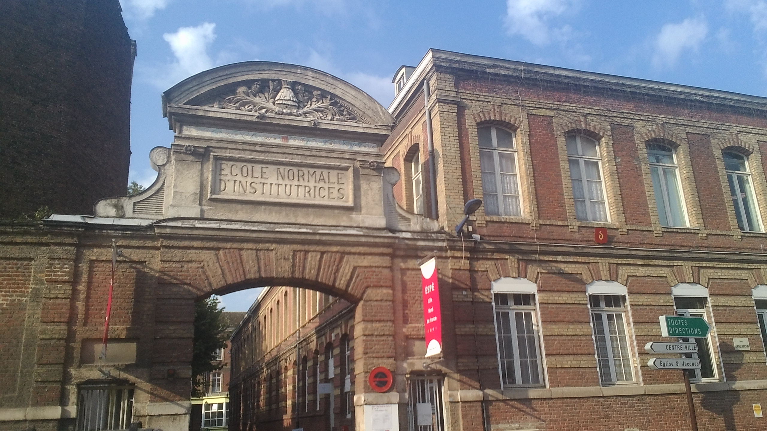 photo